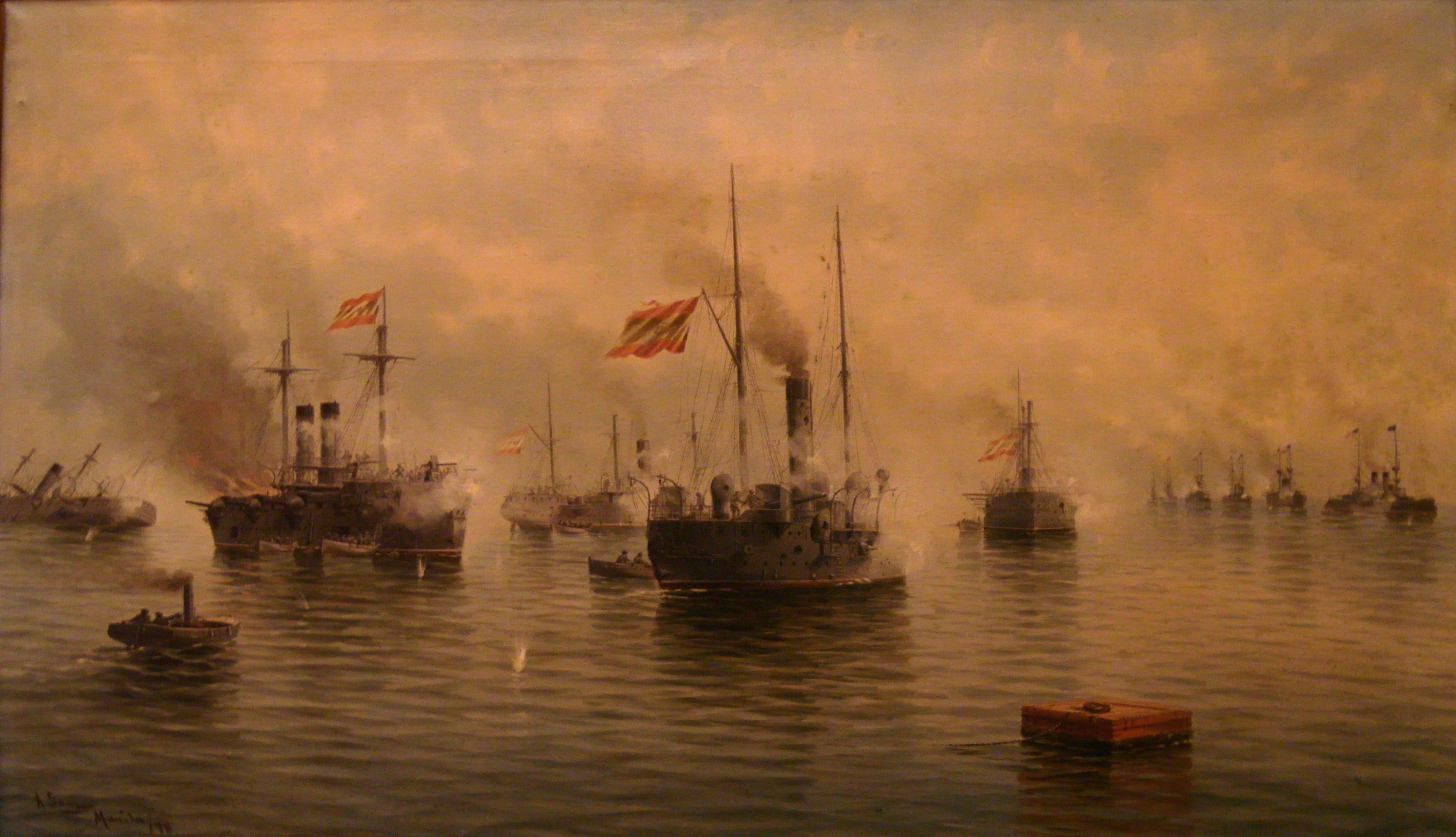 El lienzo representa la batalla de Cavite, que se libró en 1898 durante la Guerra hispanoamericana y supuso una enorme derrota para España, ya que casi toda la flota española resultó aniquilada.